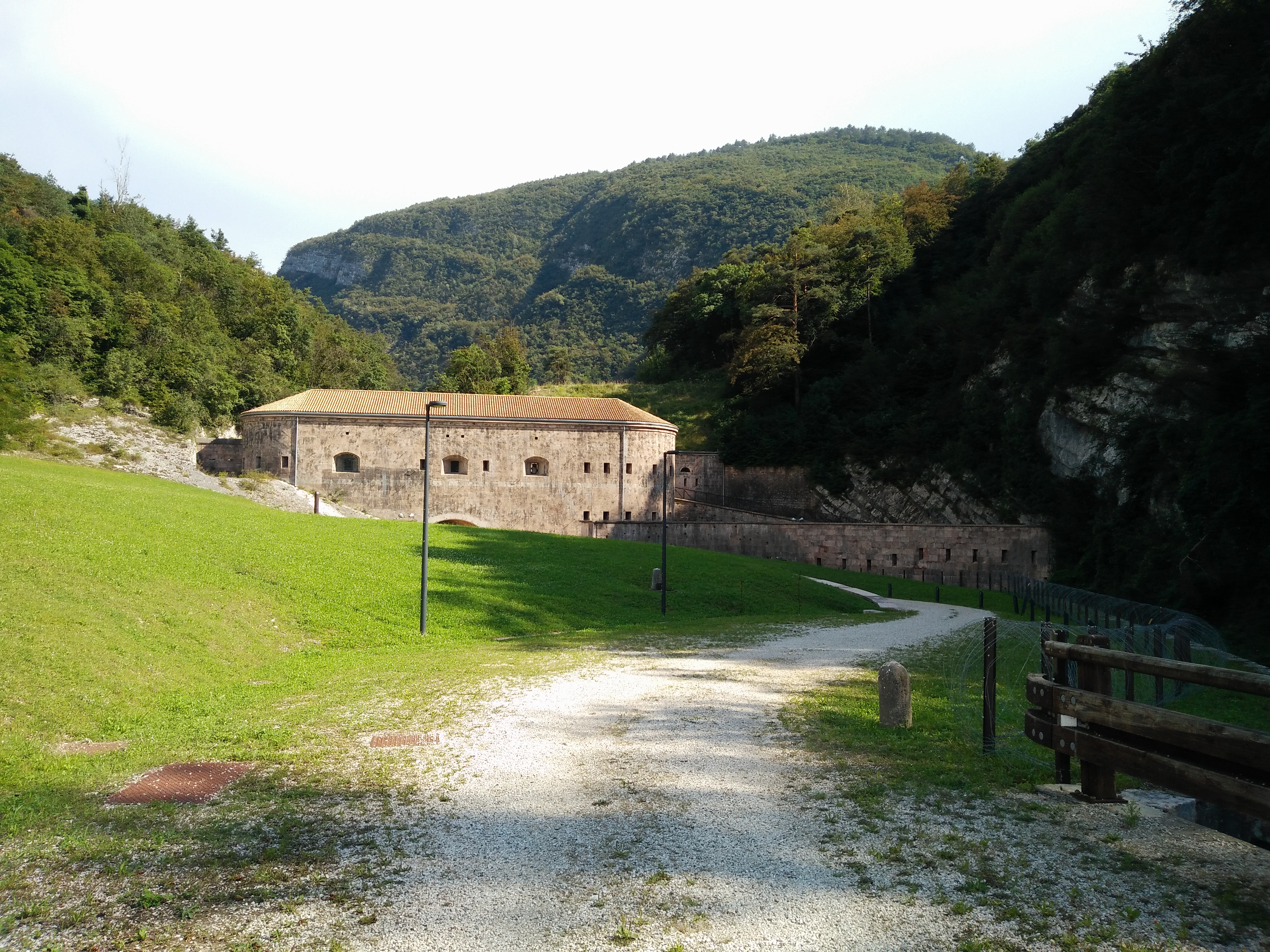 Forte Bus de Vela This is a photo of a monument which is part of cultural heritage of Italy.